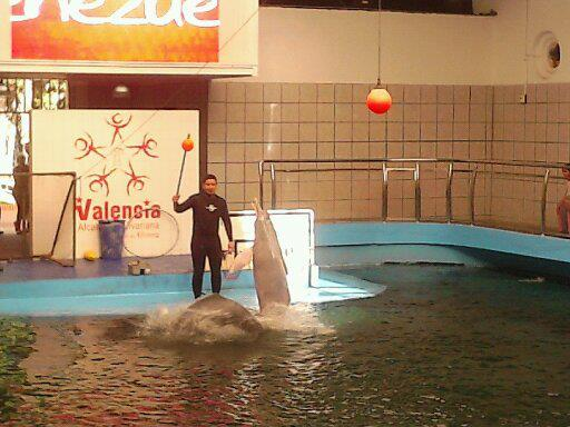 Las dos Toninas restantes en el Acuario de Valencia, Venezuela.